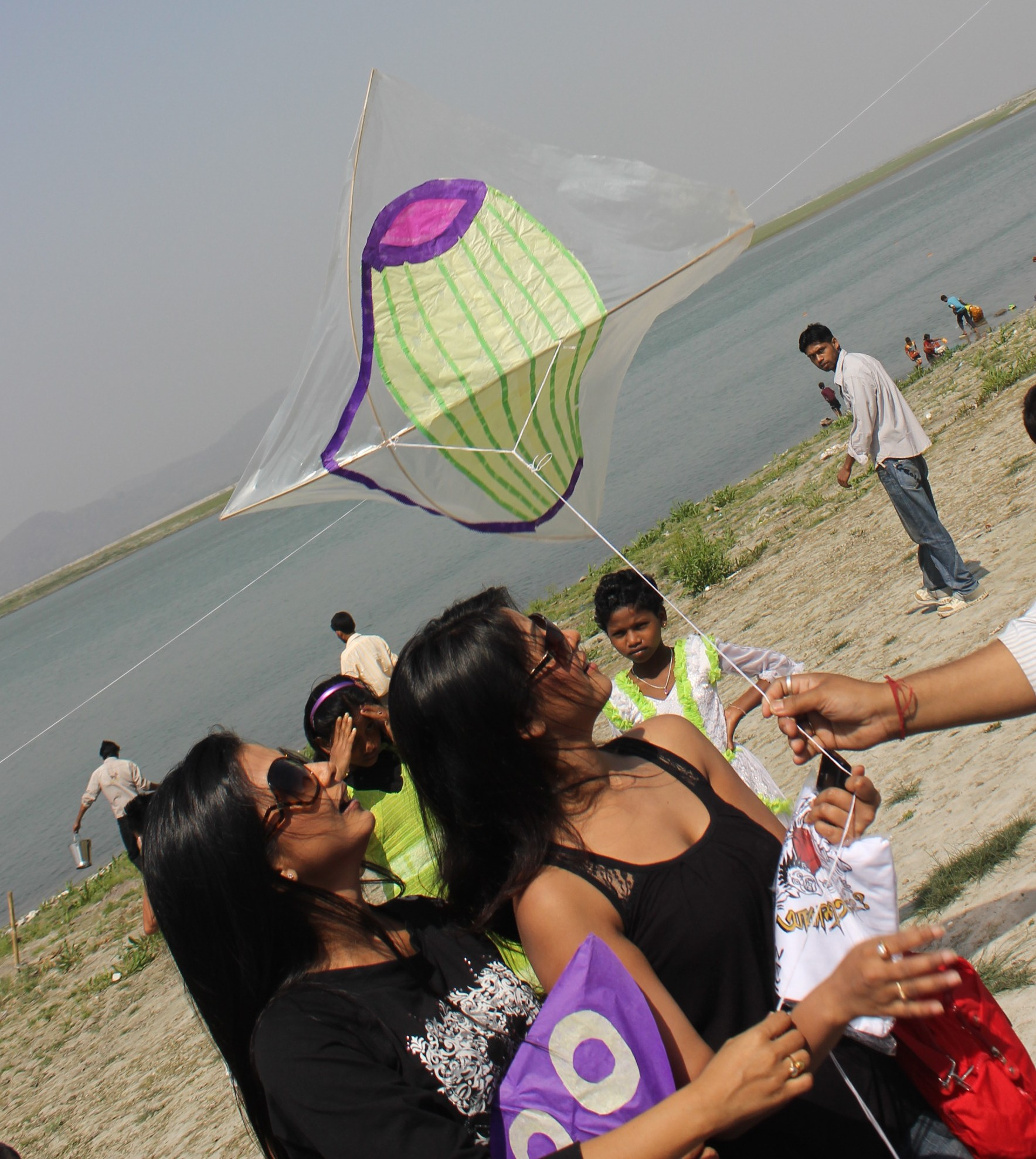 অসমীয়া: গুৱাহাটীৰ উজানবজাৰৰ ব্রহ্মপুত্রৰ বালিচৰত আয়োজিত জীৱন চিলা উৎসৱ(২৬-০২-২০১২)ৰ এটি দৃশ্যত অভিনেত্রী আইমী বৰুৱা আৰু ৰিম্পি দাস।